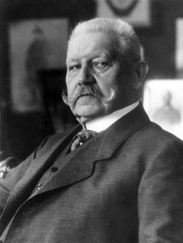 Hindenburg